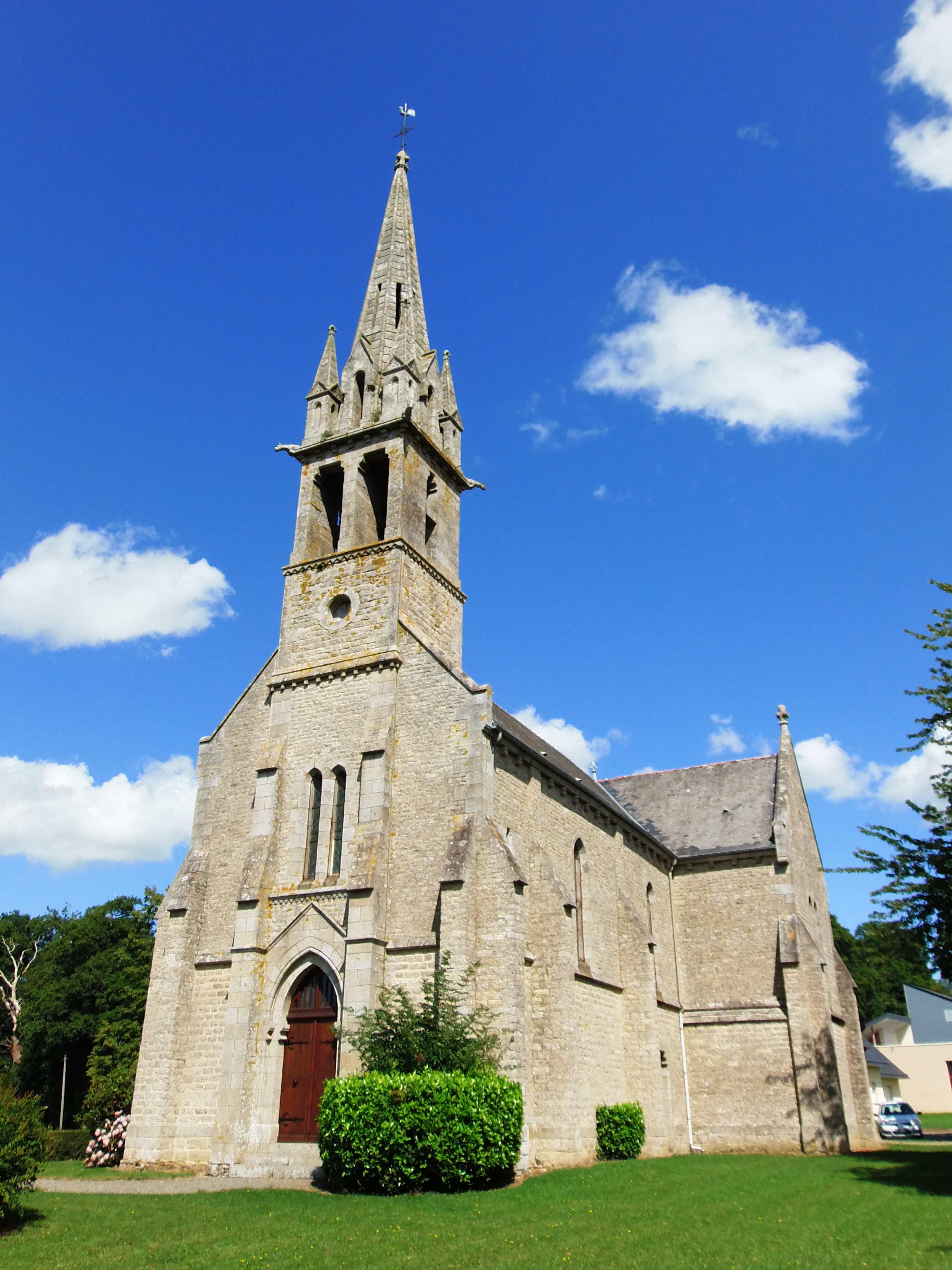 Vue de l'église depuis l'espace vert